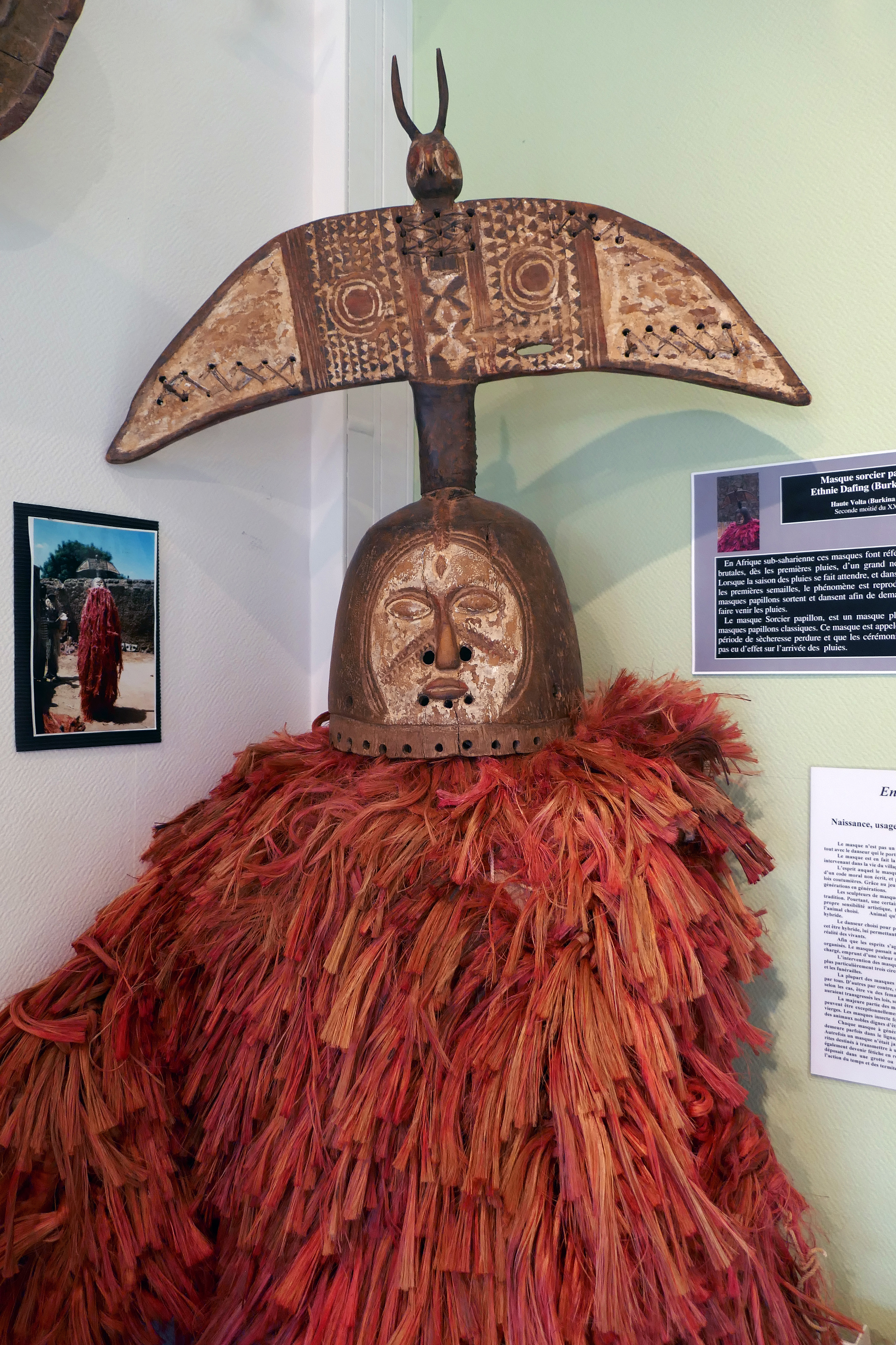 Masque sorcier papillon, Dafing, HauteVolta (Burkina Faso), seconde moitié du XXe siècle. Collection particulière.